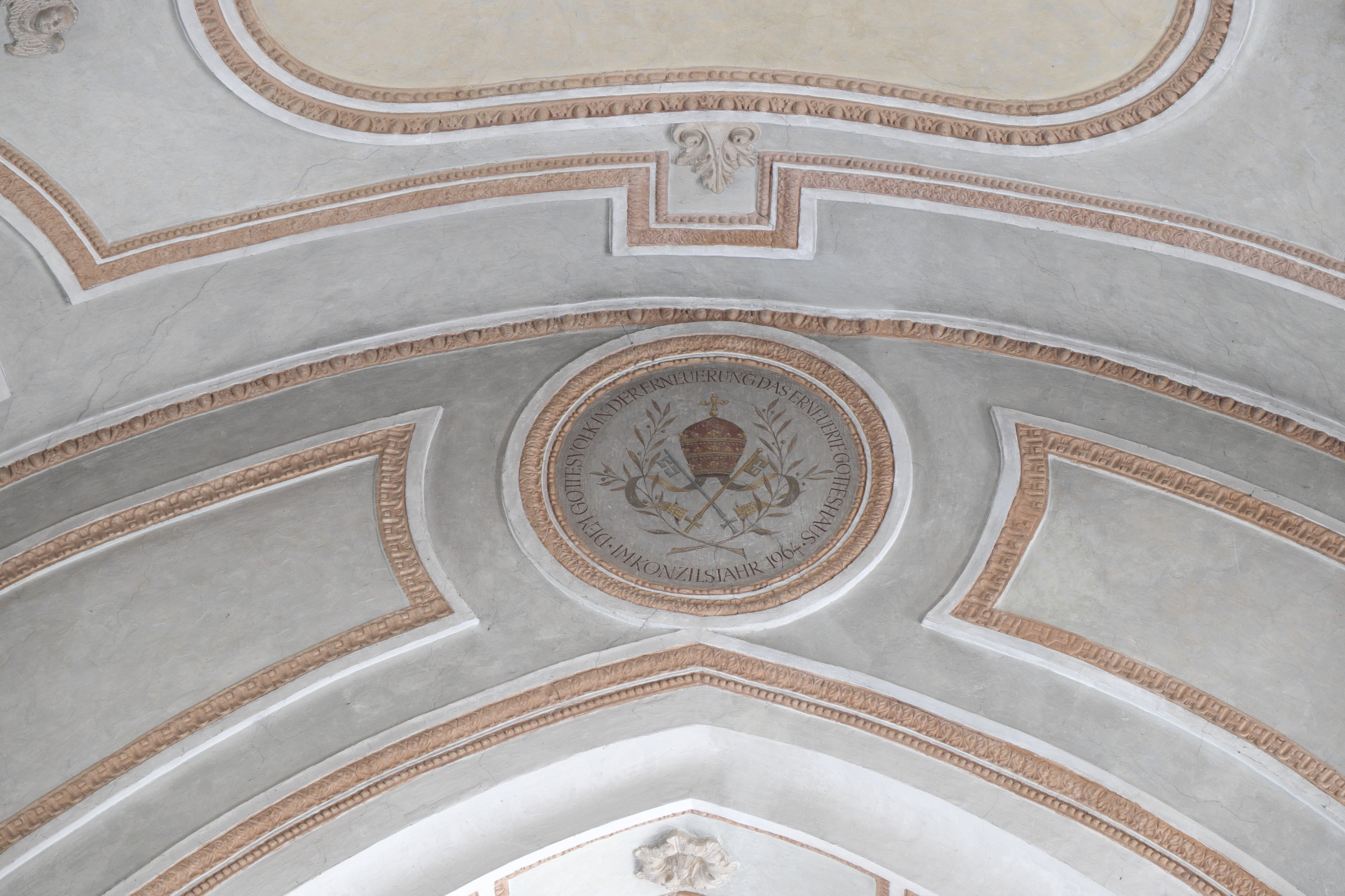 Katholische Pfarrkirche St. Peter und Paul in Oberalting, einem Ortsteil von Seefeld (Bayern/Deutschland)